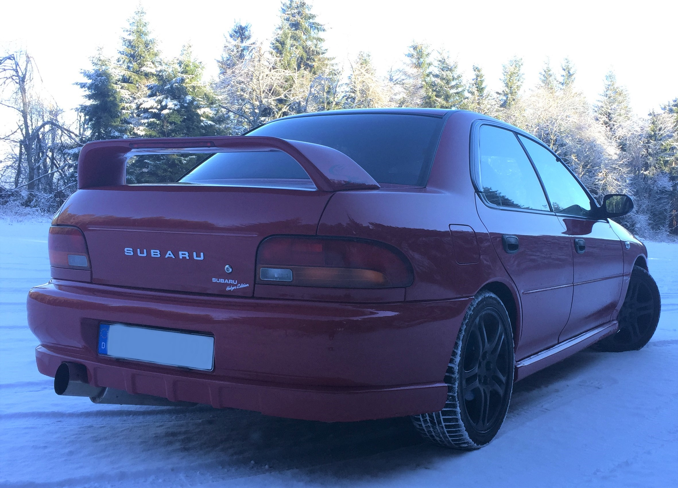 1998er Subaru Impreza 2.0GL "Holzer Edition" im Schnee von hinten (Es sind 1998er WRX-Felgen montiert, nicht die zum Sondermodell gehörigen Holzer-Felgen)